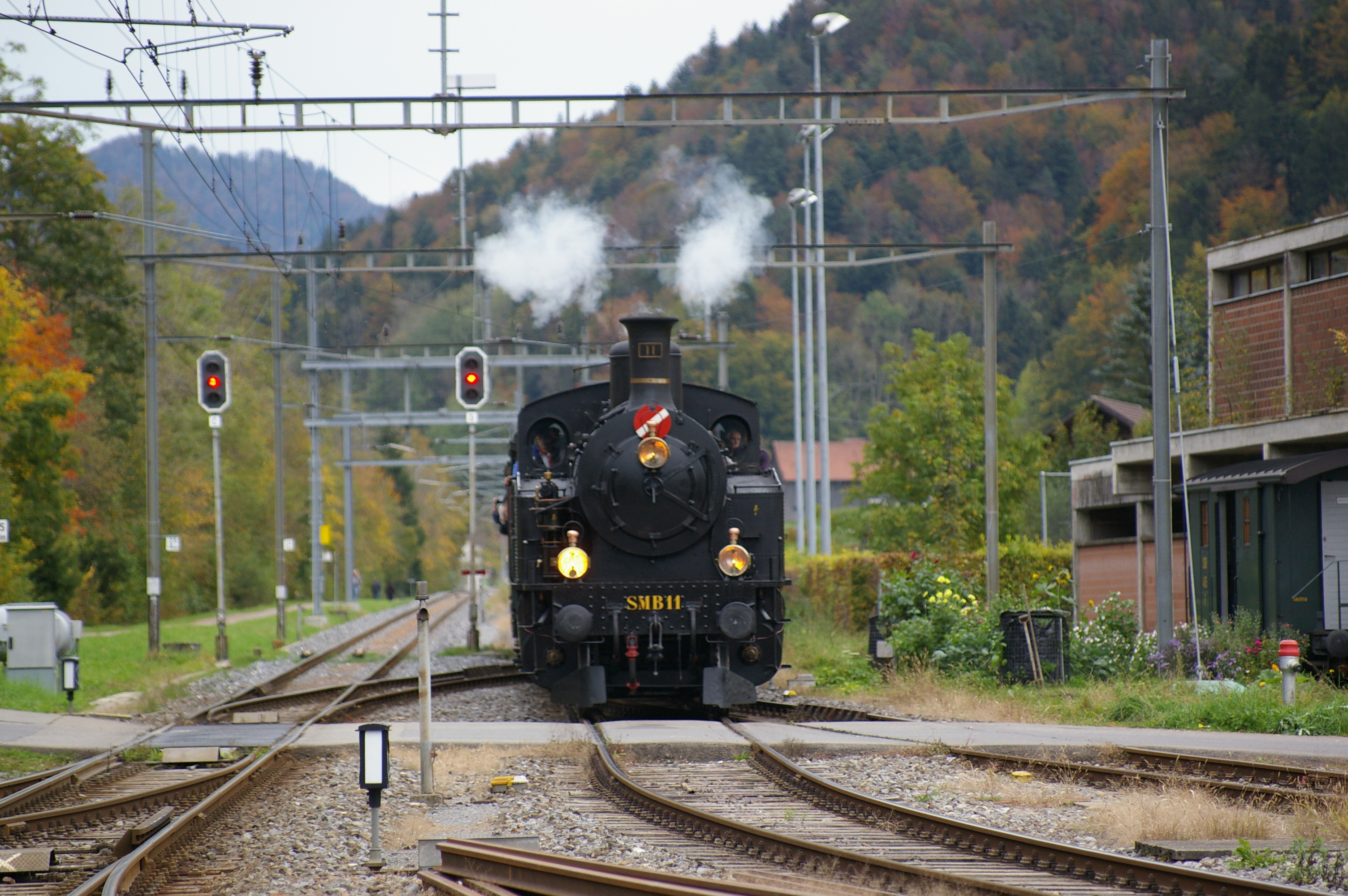 Vorderanſicht der Dampflocomotive Ec 4/5 Nr. 11 des Vereins Dampfbahn Bern, gebaut 1911 inn der Schweizeriſchen Locomotiv- und Machinen-Fabrique zů Winterthur für die Solothurn—Münſter-Bahn, bey der Einfahrt von Oſten in Bahnhof von Bauma.